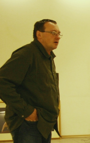 Fotomeninikas Saulius Paukštys 2004 m. ruošdamas savo darbų parodą Prospekto galerijoje Vilniuje.